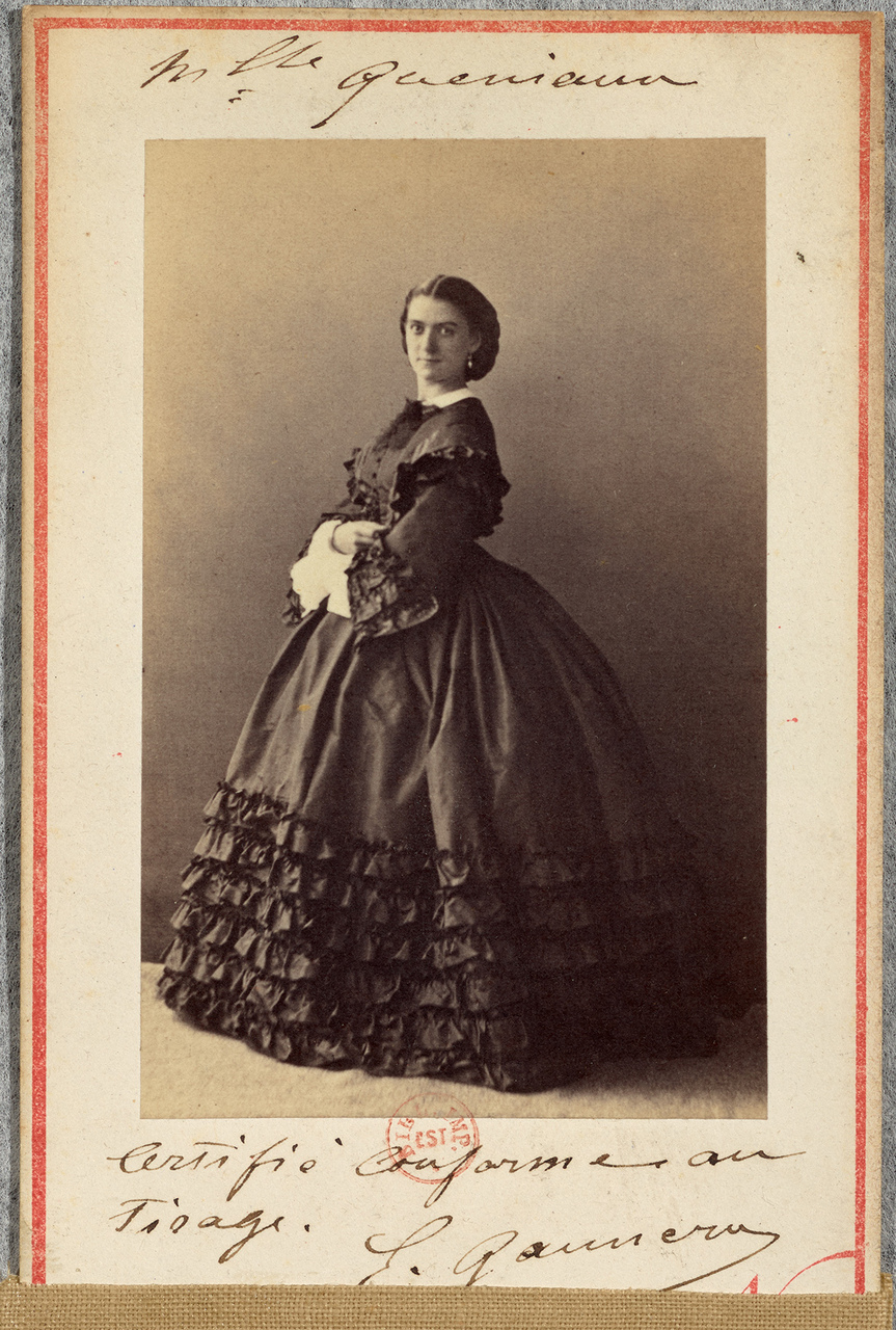 Constance Quéniaux photographiée par Pesme